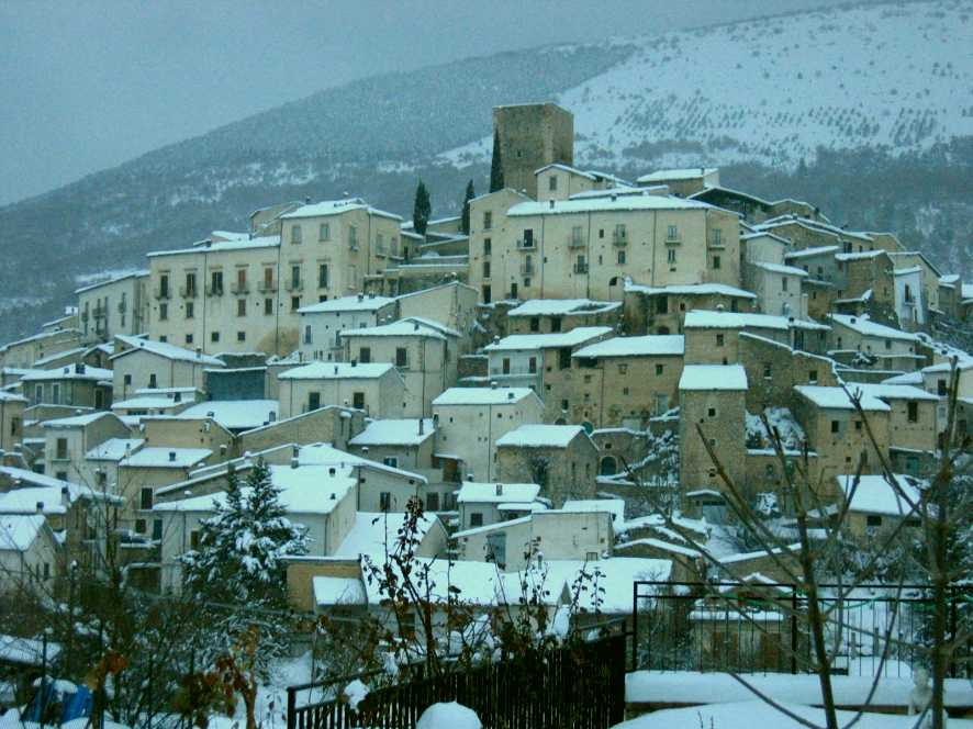 Panorama del centro storico di Castel di Ieri